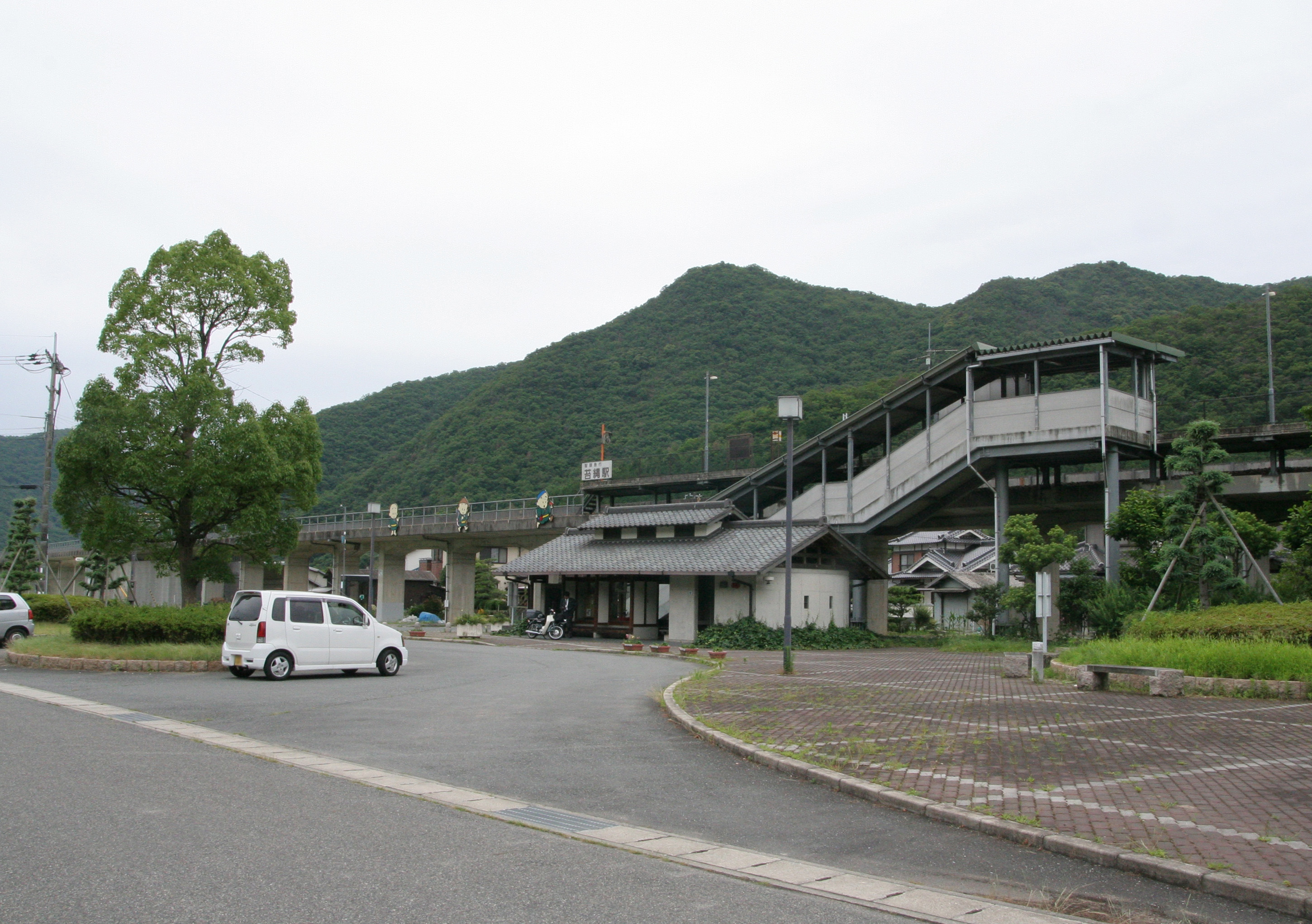 智頭急行 苔縄駅の全体の様子